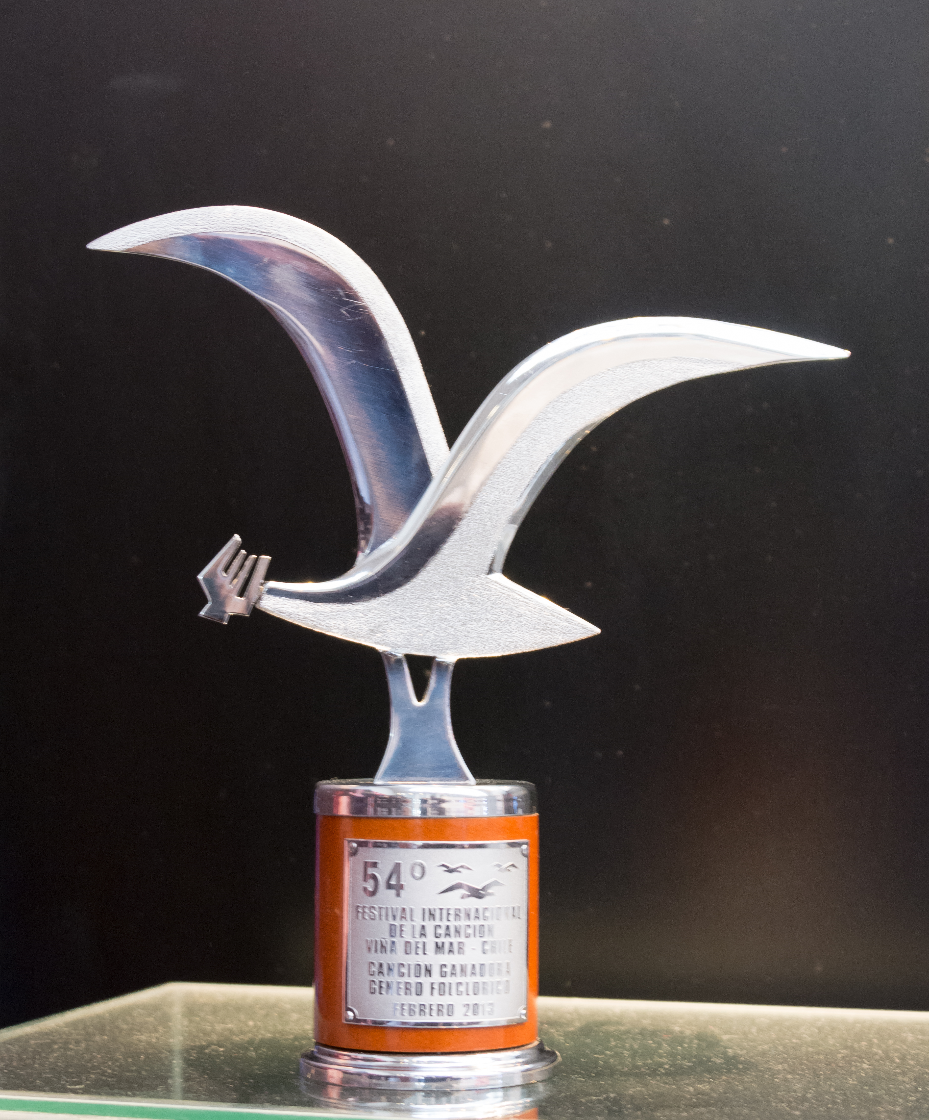 Feria vacaciones tercera edad Sernatur 2019, Providencia, Santiago, Chile.